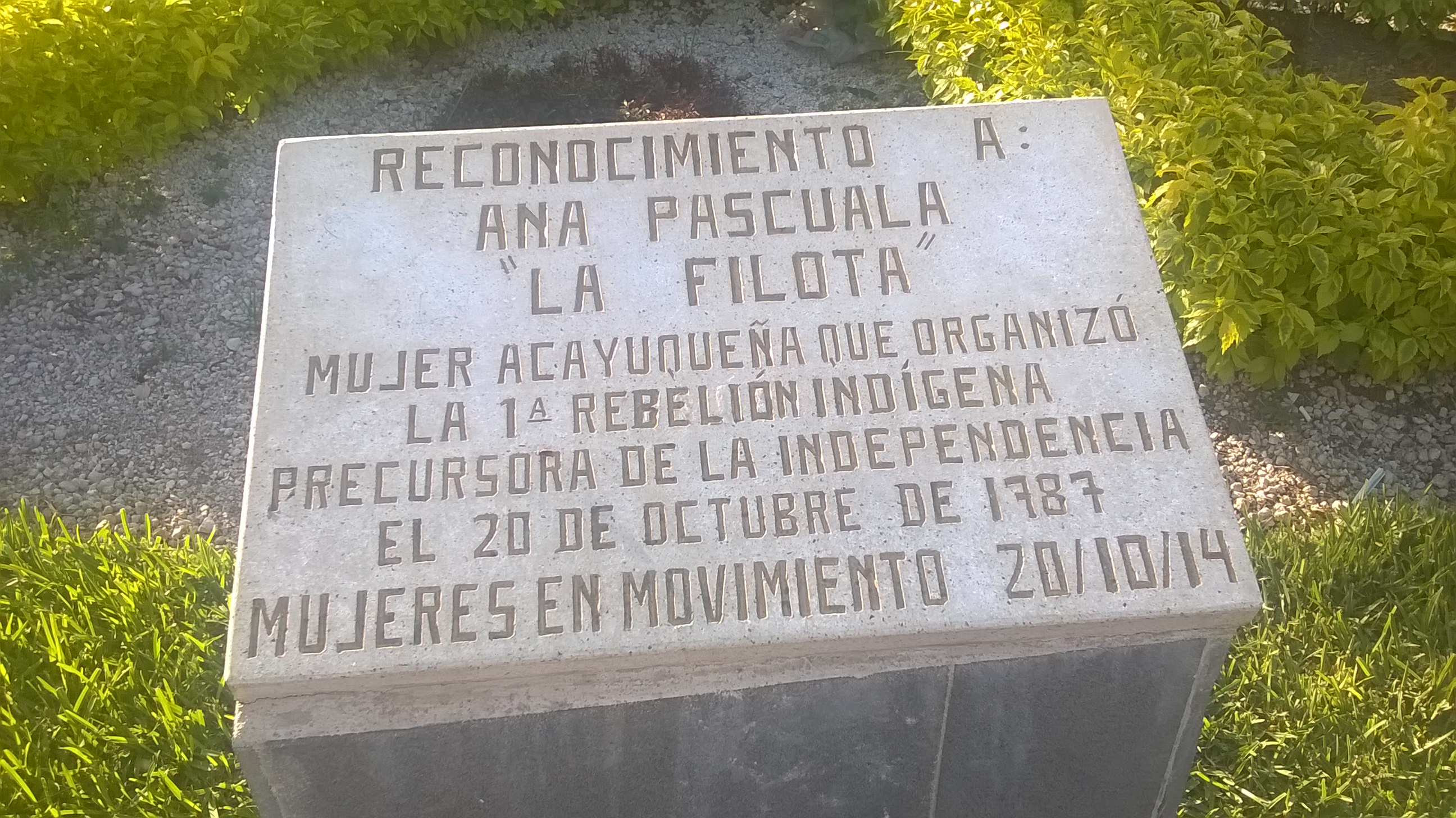 Placa de la Rebelión de Acayucan, Veracruz en 1787